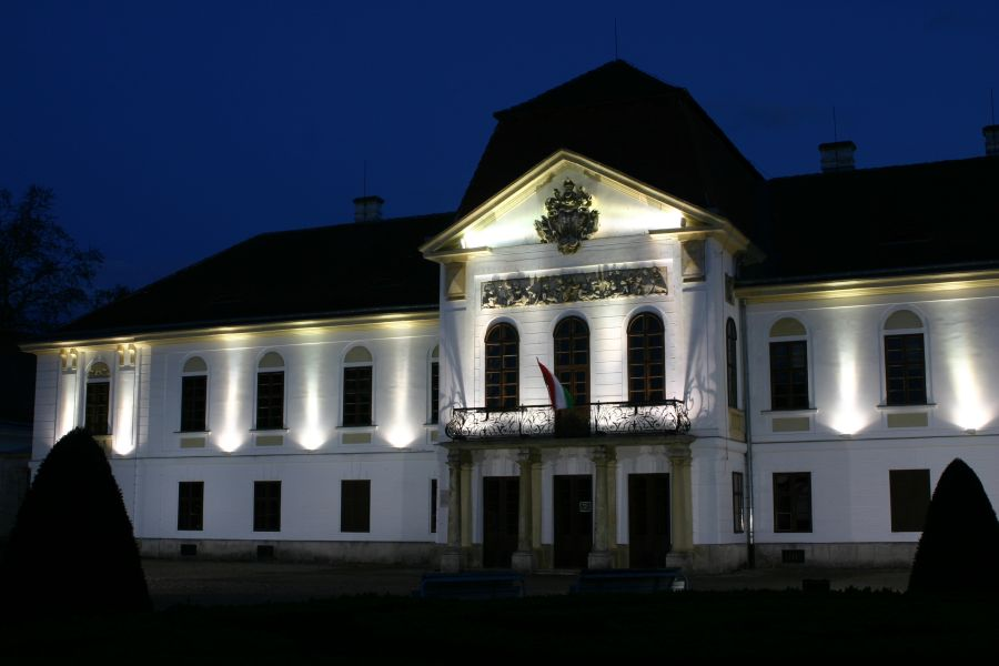 Széchenyi-kastély esti díszkivilágításban, Nagycenk, Győr-Moson-Sopron megye